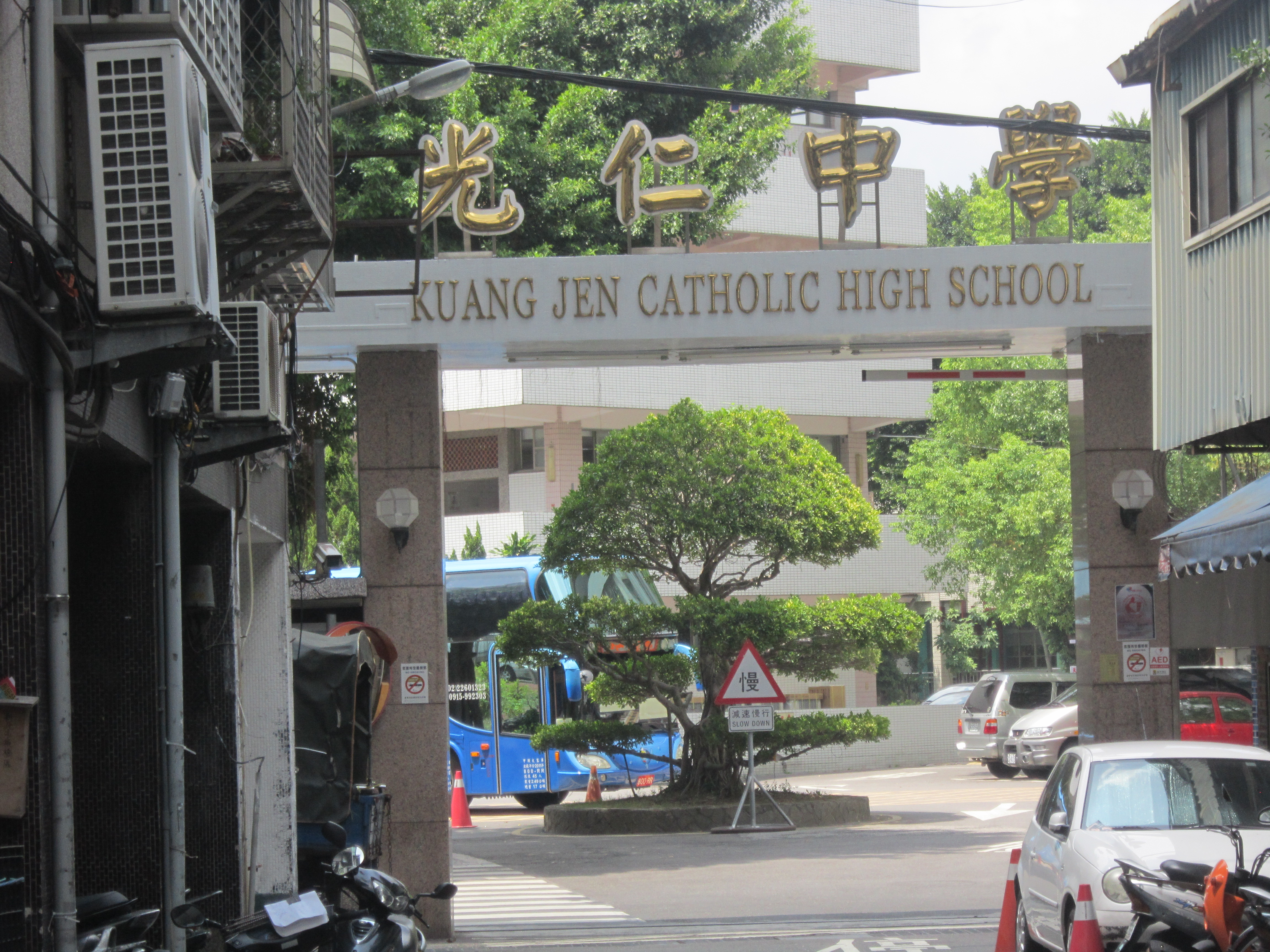 位於新北市板橋區光仁中學的大門